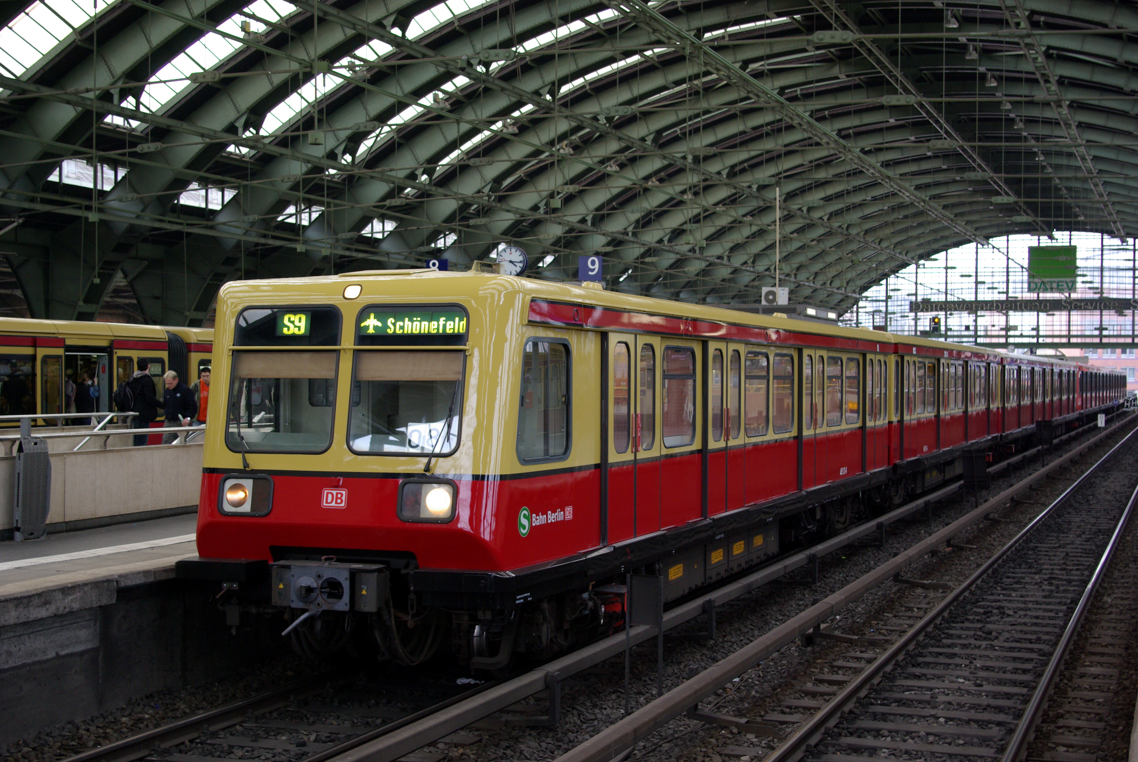 485/885 121 frisch neulackiert in Berlin Ostbahnhof